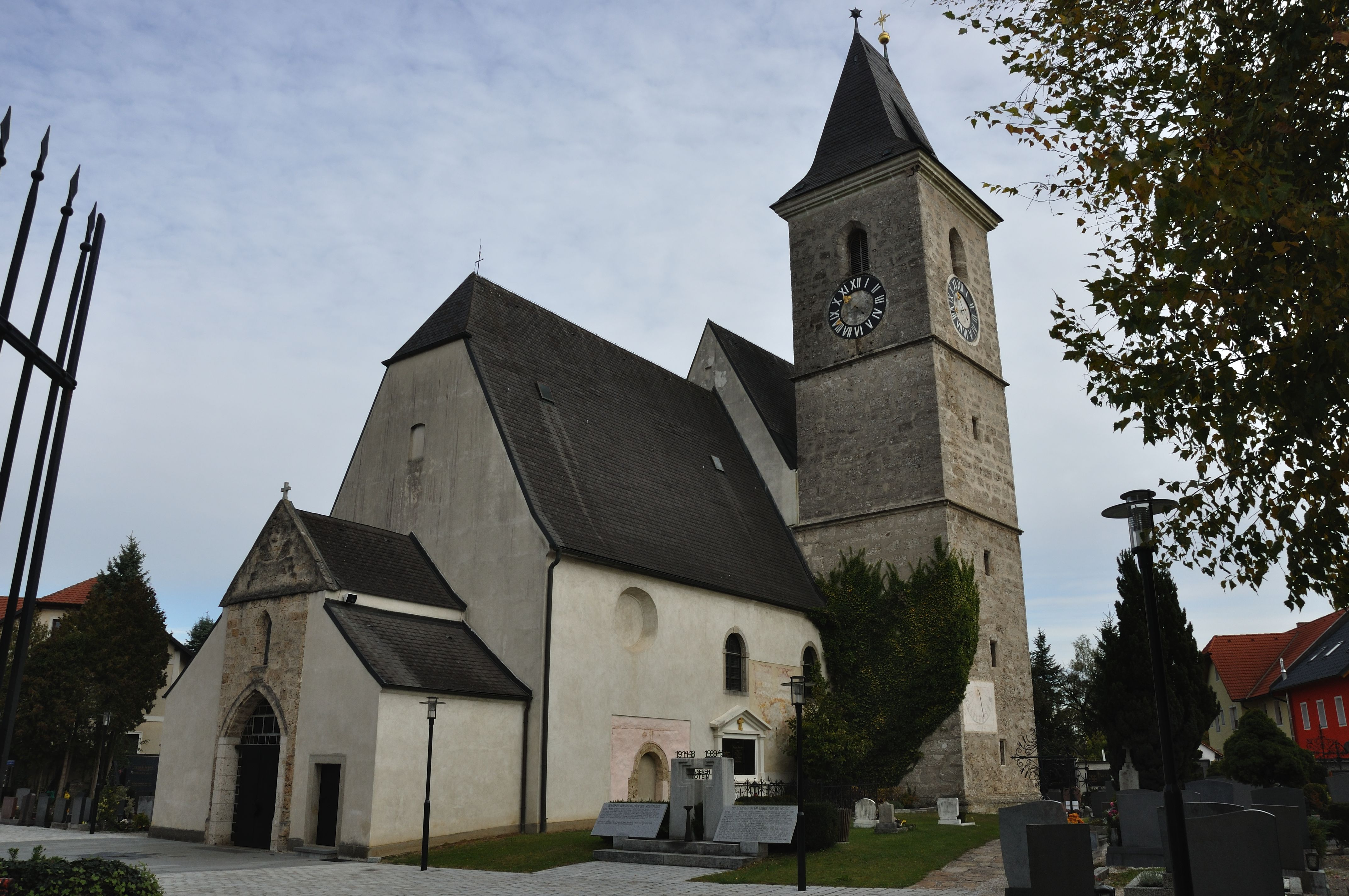 Kath. Pfarrkirche hll. Bartholomäus und Katharina